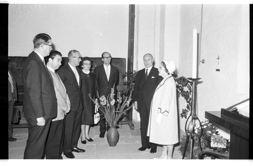 in der Nikolaikirche. Im Bild Frau Parfitt (1.v.r.), stellvertretender Bürgermeister von Coventry William Parfitt (2.v.r.), Pastor Hans-Christoph Schmidt-Lauber (3.v.r.), Ratsherrin Rosa Wallbaum (4.v.r.), Ratsherr der Stadt Coventry Suddick (5.v.r.), Ratsherr der Stadt Coventry Hughes (6.v.r.) und Bürgermeister Rudolf Titzck (7.v.r.).